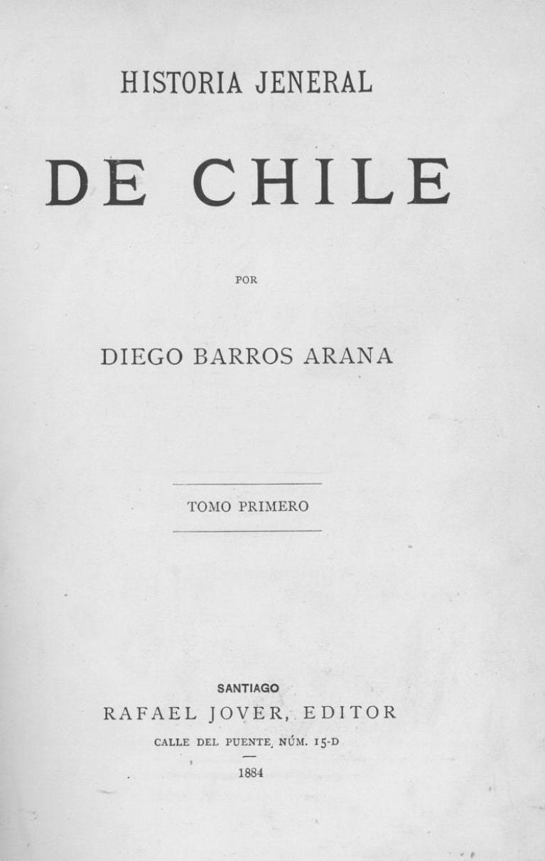 Diego Barros Arana, 1830-1907. Historia general de Chile. Año: 1884